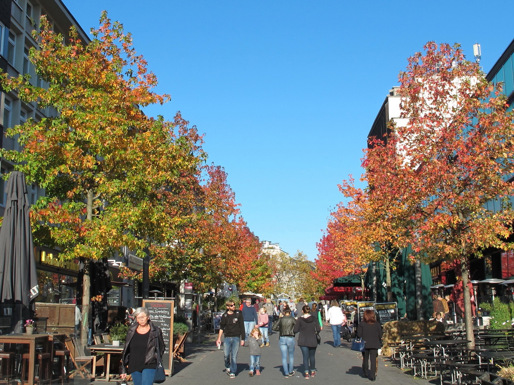 Das Bermuda3eck am Anfang der Kortumstraße